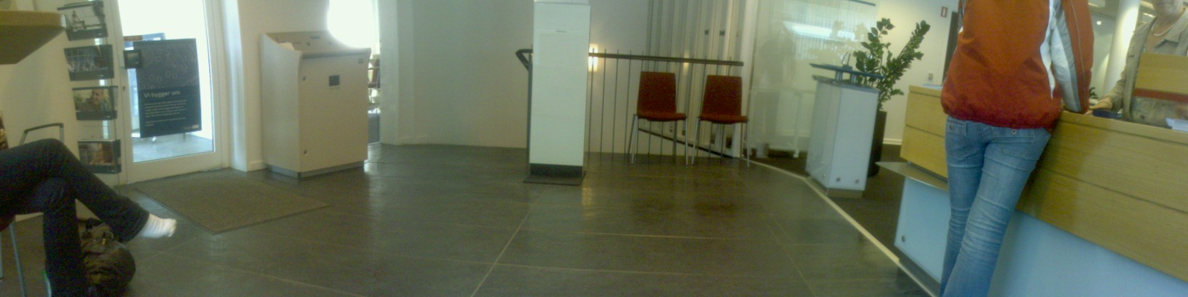 Indoor panorama of Danske Bank